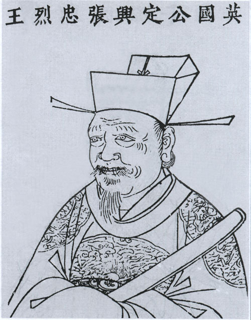 中文（中国大陆）: 张辅，明朝军事将领